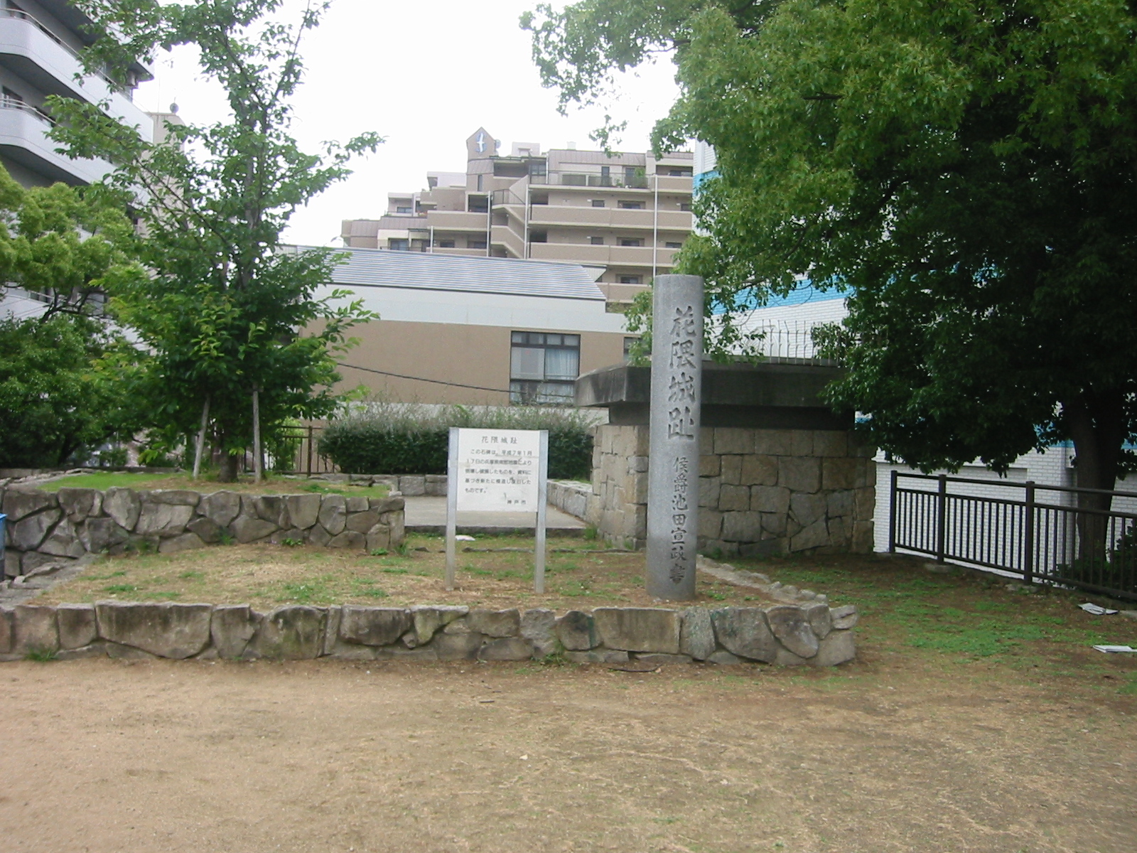 花隈城にて。